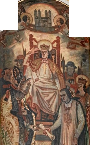 Fürth, kath. Kirche St. Heinrich, Hochaltarbild von Paul Thalheimer: Der hl. Heinrich gründet das Bistum Bamberg